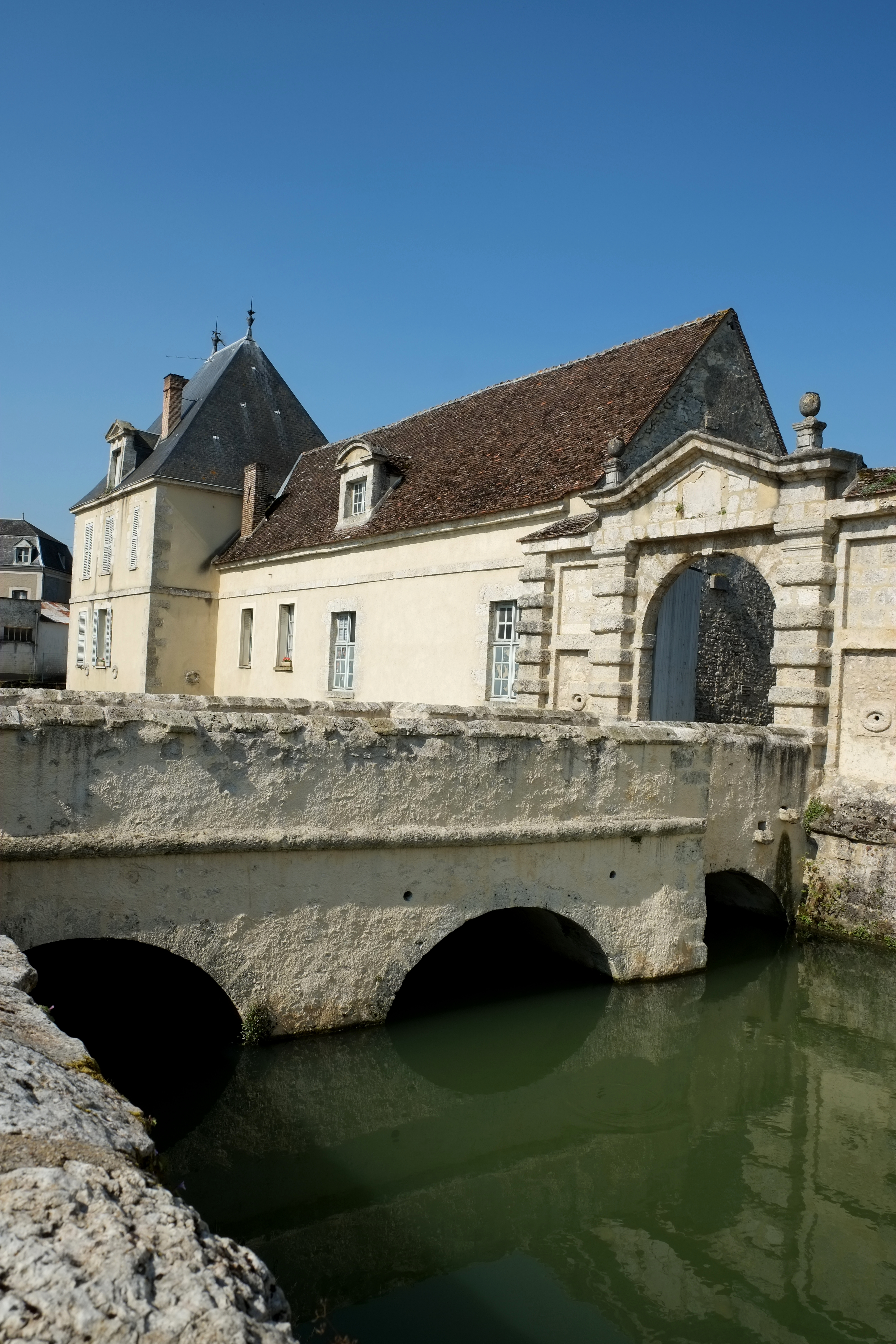 Ehemaliges Schloss in Beaumont-du-Gâtinais (Frankreich)